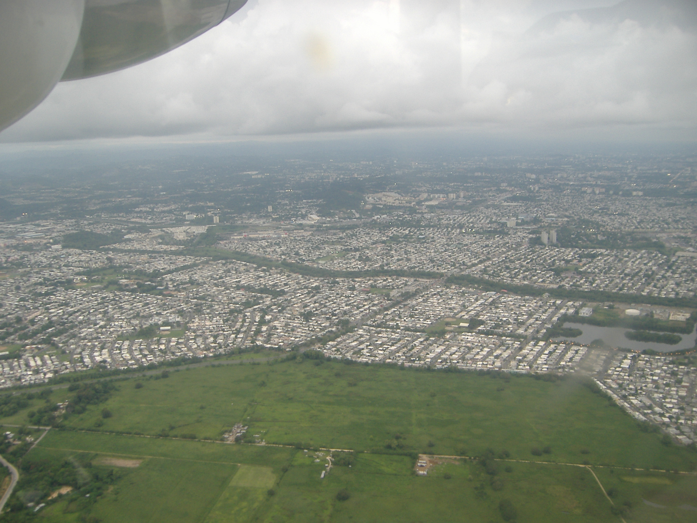 Aerial view of Carolina, Puerto Rico.